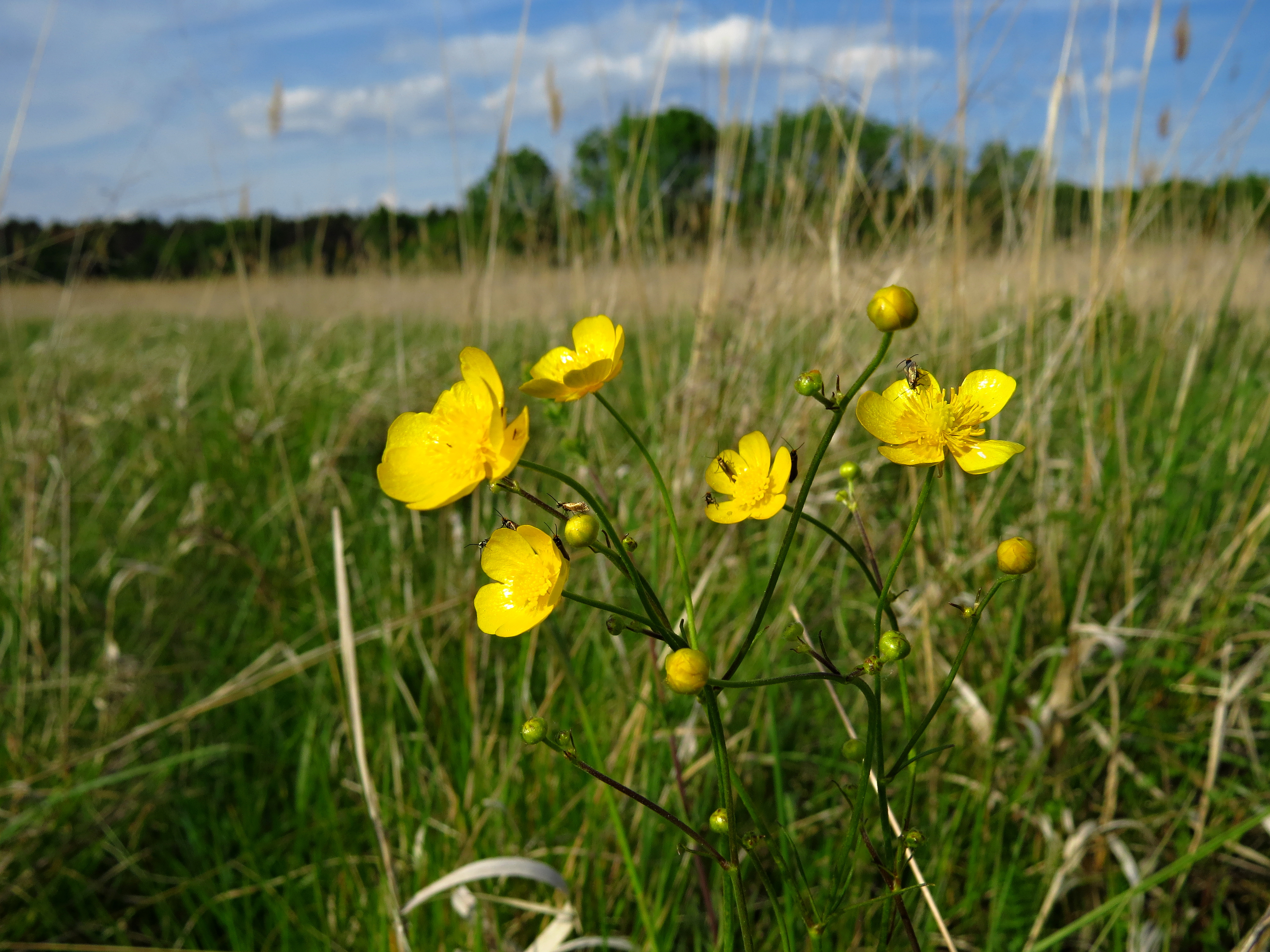 Pryskyřník hlíznatý (Ranunculus bulbosus) Project: Chráněná území